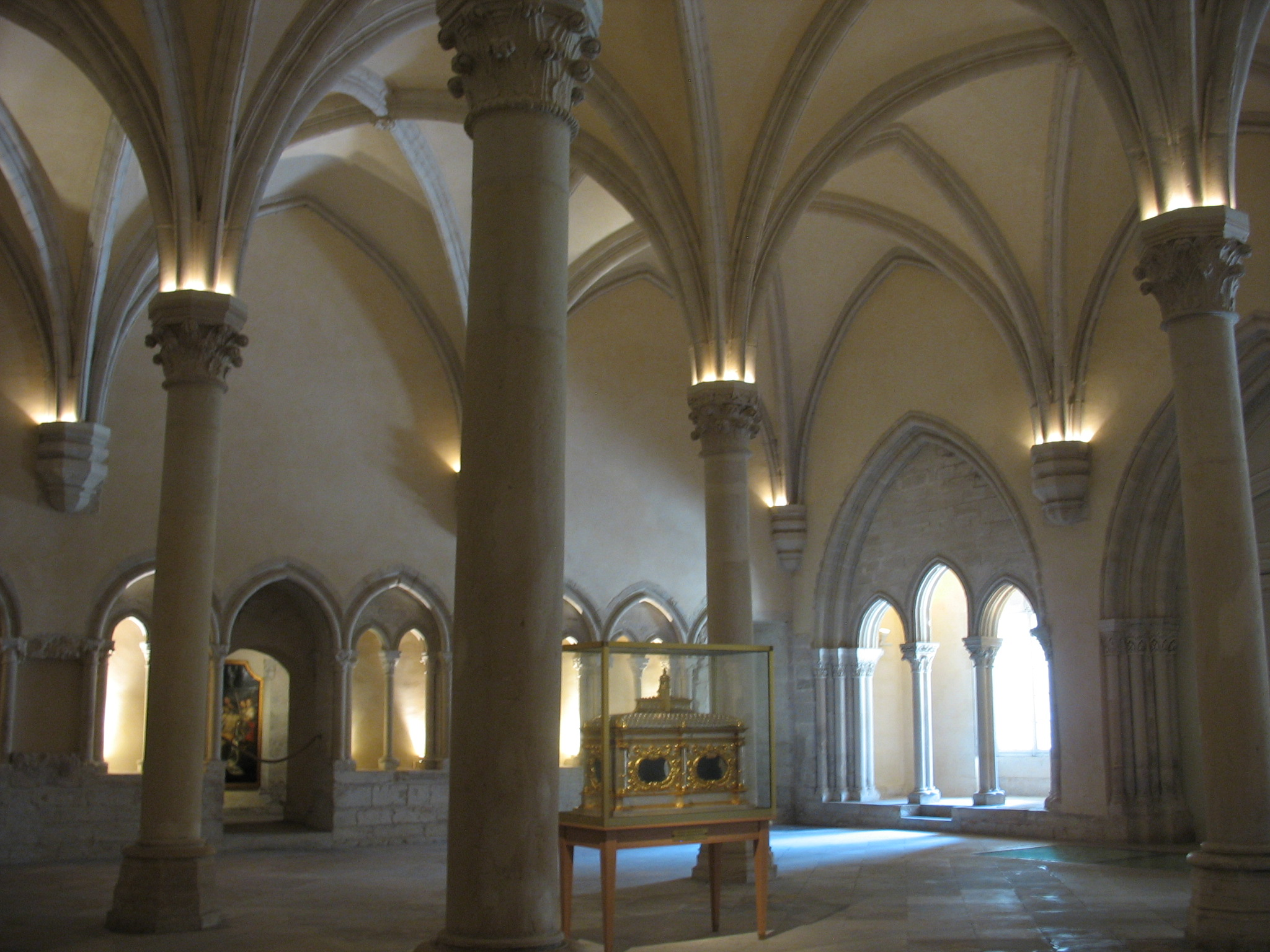 Le musée Saint-Rémi de Reims (Champagne-Ardenne, France)